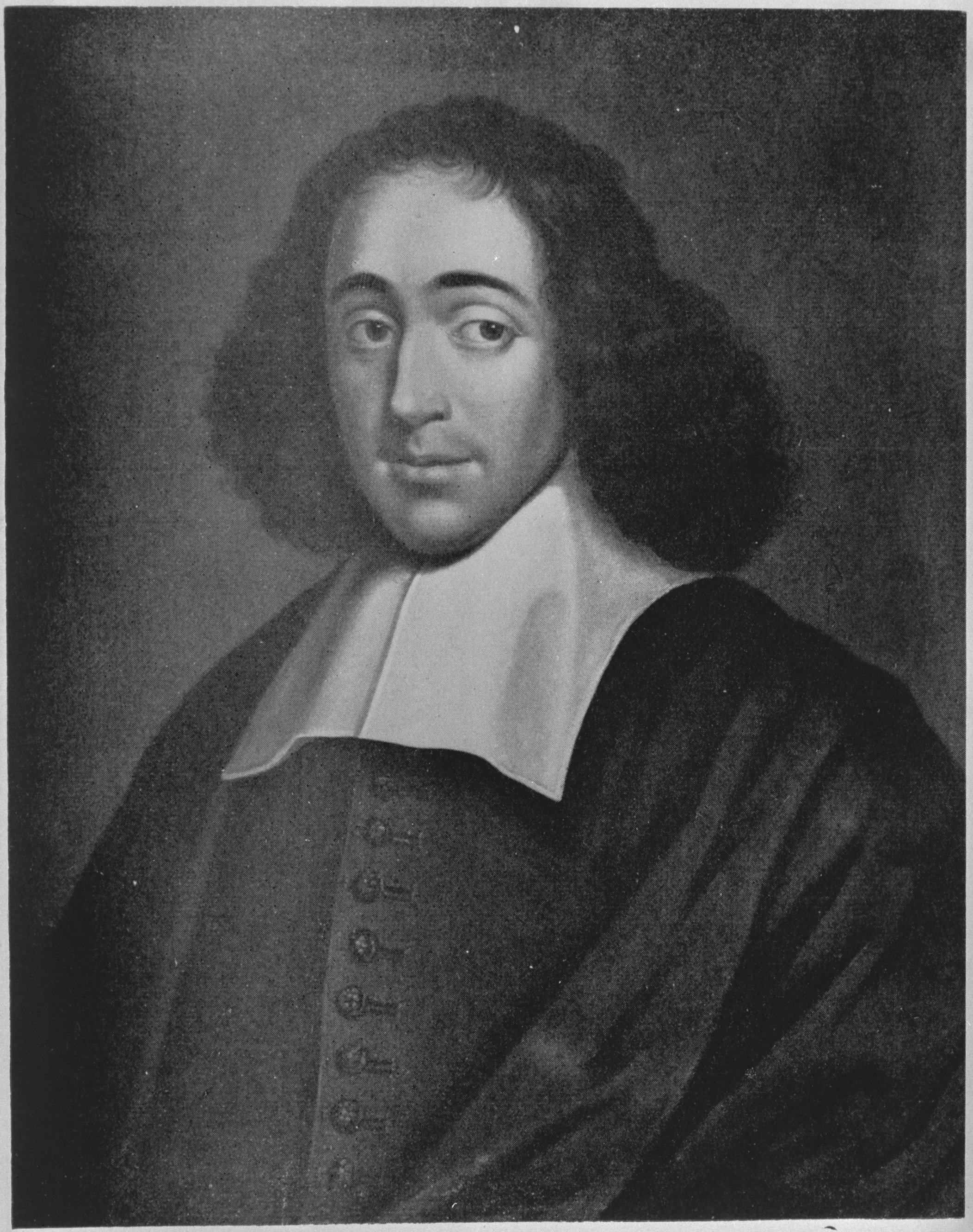 Collectie / Archief : Fotocollectie Anefo / Londen Reportage / Serie : P [Portraits/Persons] / Anefo Londen serie Beschrijving : Benedictus (Baruch) Spinoza (anoniem schilderij, Gemeentemuseum Den Haag) Annotatie : Repronegatief Datum : 1940-1945 Trefwoorden : filosofen, portretten, schilderijen, wijsgeren Persoonsnaam : Spinoza, Baruch de Fotograaf : Onbekend / Publiek Domein Auteursrechthebbende : Nationaal Archief Materiaalsoort : Negatief (zwart/wit) Nummer archiefinventaris : bekijk toegang 2.24.01.04 Bestanddeelnummer : 935-0843